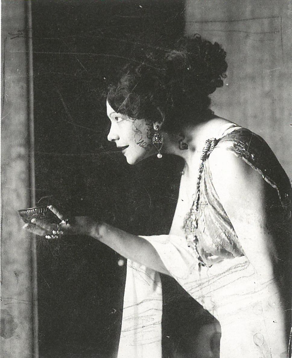 Fotografie von Franz oder Mary von Stuck, die Tilla Durieux in der Rolle der Circe zeigt. Das Foto diente als Vorlage für das Gemälde "Tilla Durieux als Circe" von Franz von Stuck